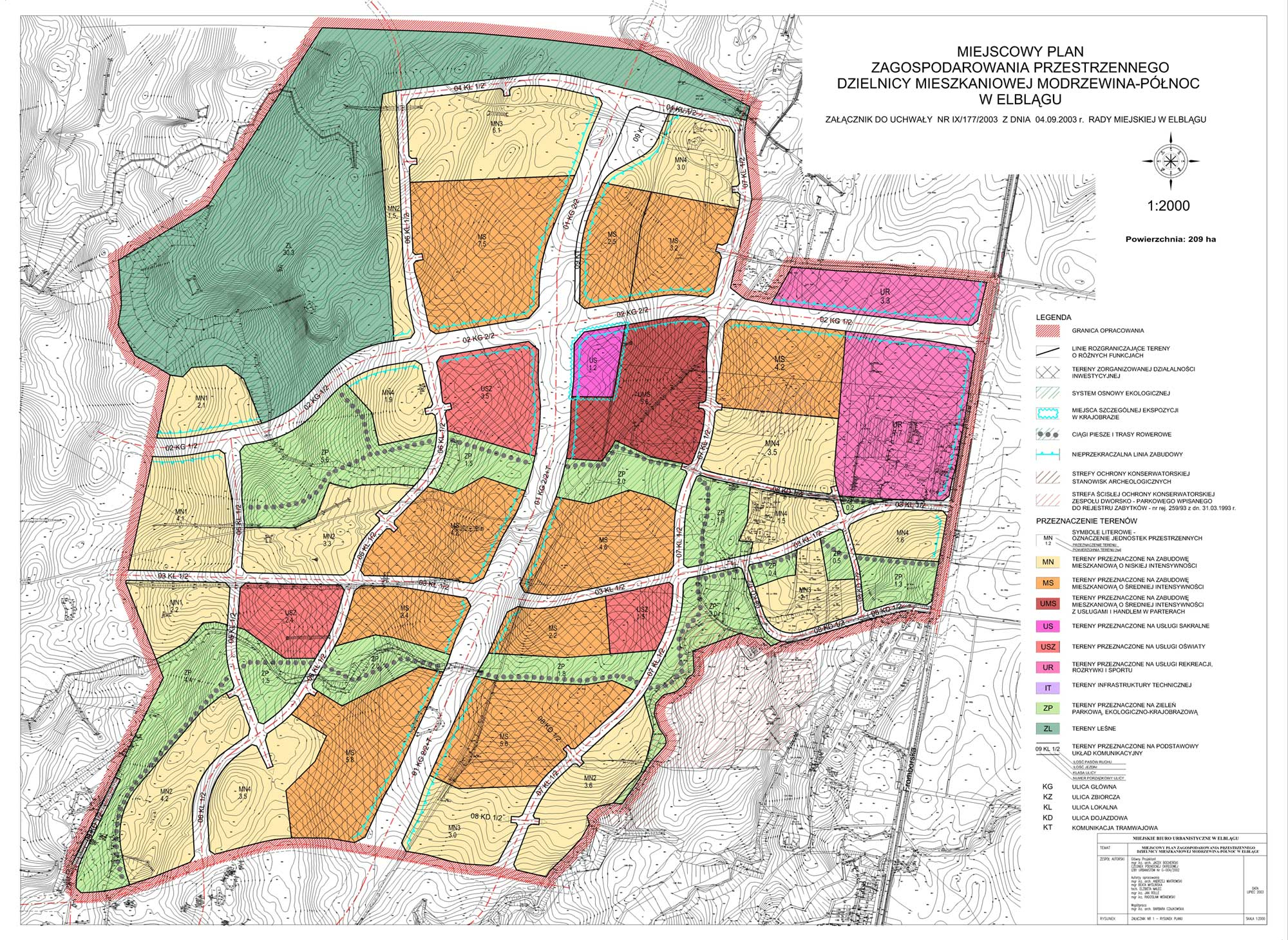 Miejscowy Plan Zagospodarowania Przestrzennego terenu Modrzewina-Północ